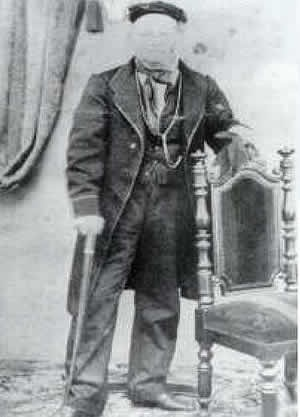 Francisco Marcelino Augier, el importante minero, después de haber sido gobernador dos veces de Catamarca, diputado nacional, en su vejez. Circa 1875.